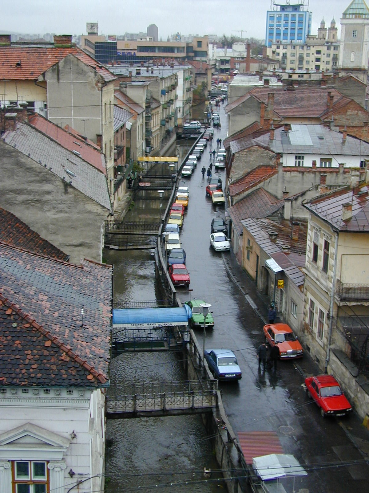 Kolozsvár:Malomárok a belvárosbanRomână: Cluj-Napoca: Canalul Morii in centrul orasului